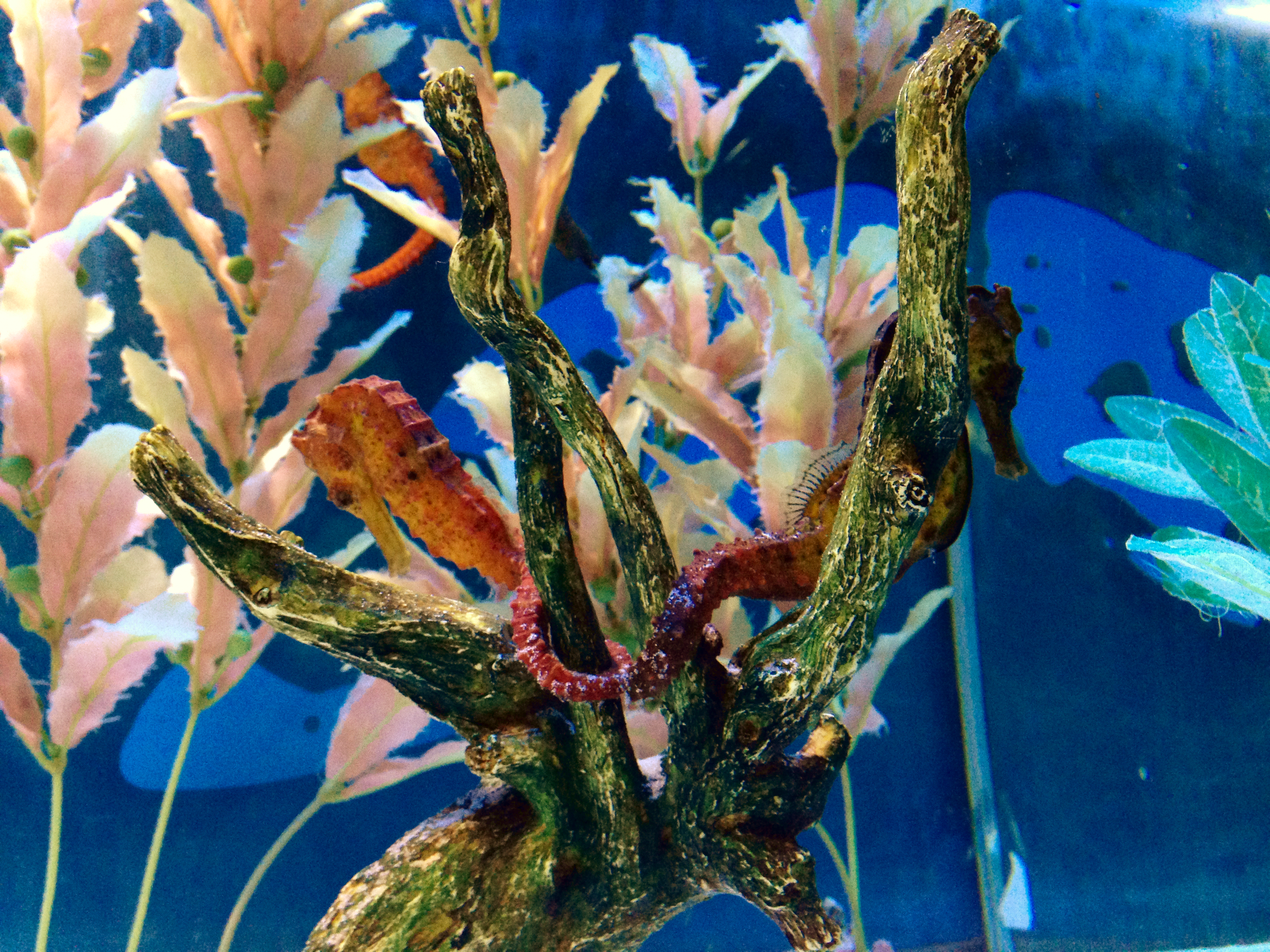 かすみがうら市水族館, オオウミウマ